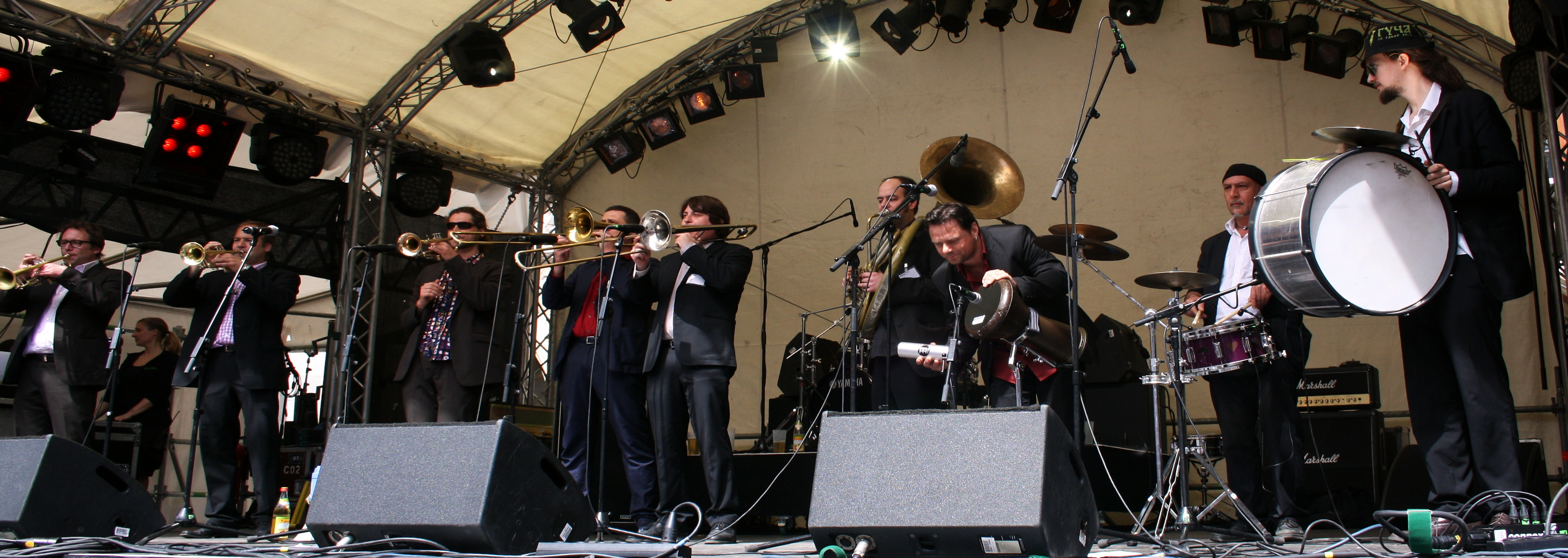 Die 9-köpfige landshuter Band "Kein Vorspiel" spielt Balkan Brass auf dem Maifest 2012 in München